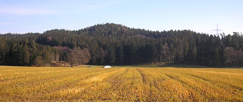 Burgstall Appertshausen (Petersdorf, Landkreis Aichach-Friedberg, Bayerisch-Schwaben). Der Burgberg von Norden. Eigene Aufnahme, Jan. 2008 / Former Appertshausen castle near Petersdorf (Landkreis Aichach-Friedberg, Bavaria, Germany). The castle hill from the north. Own photo, Jan. 2008